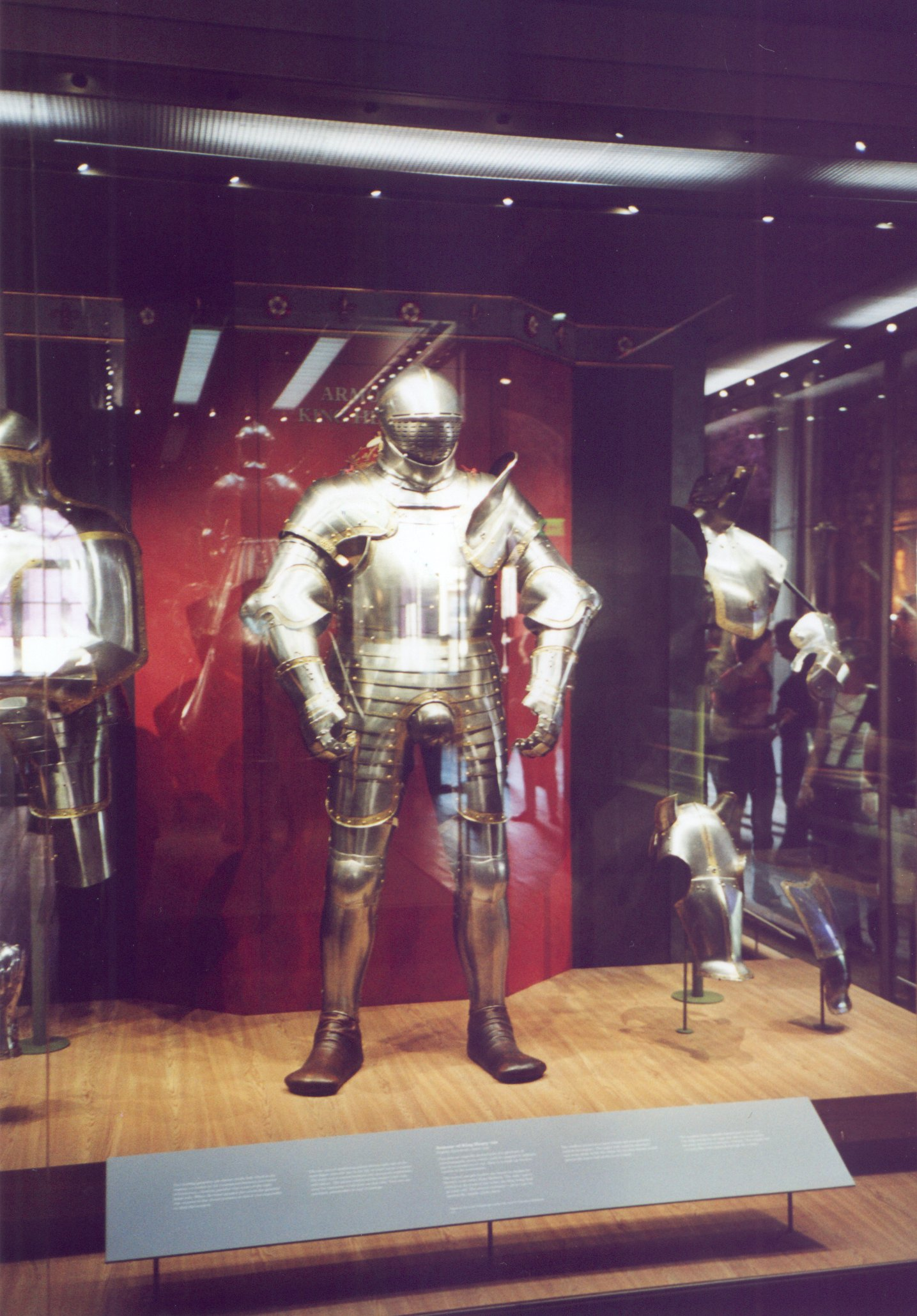 Plattenpanzer mit Schutz für den Genitalbereich. Im White Tower des Tower von London.